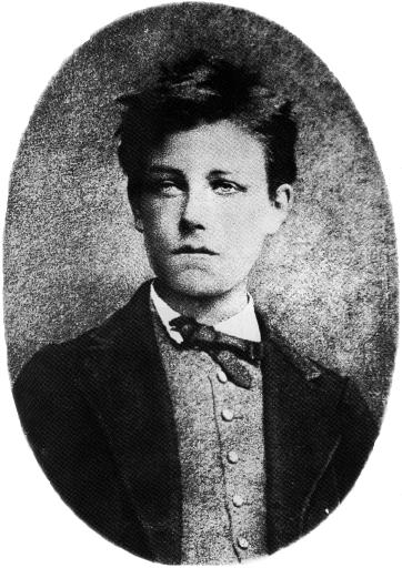 Артюр Рембо. Фотография 1871